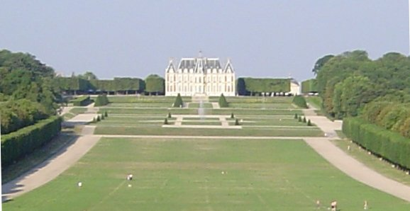 Plaine des quatre statues. Parc de Sceaux (vue coté Chatenay-Malabry), Hauts-de-Seine, France.